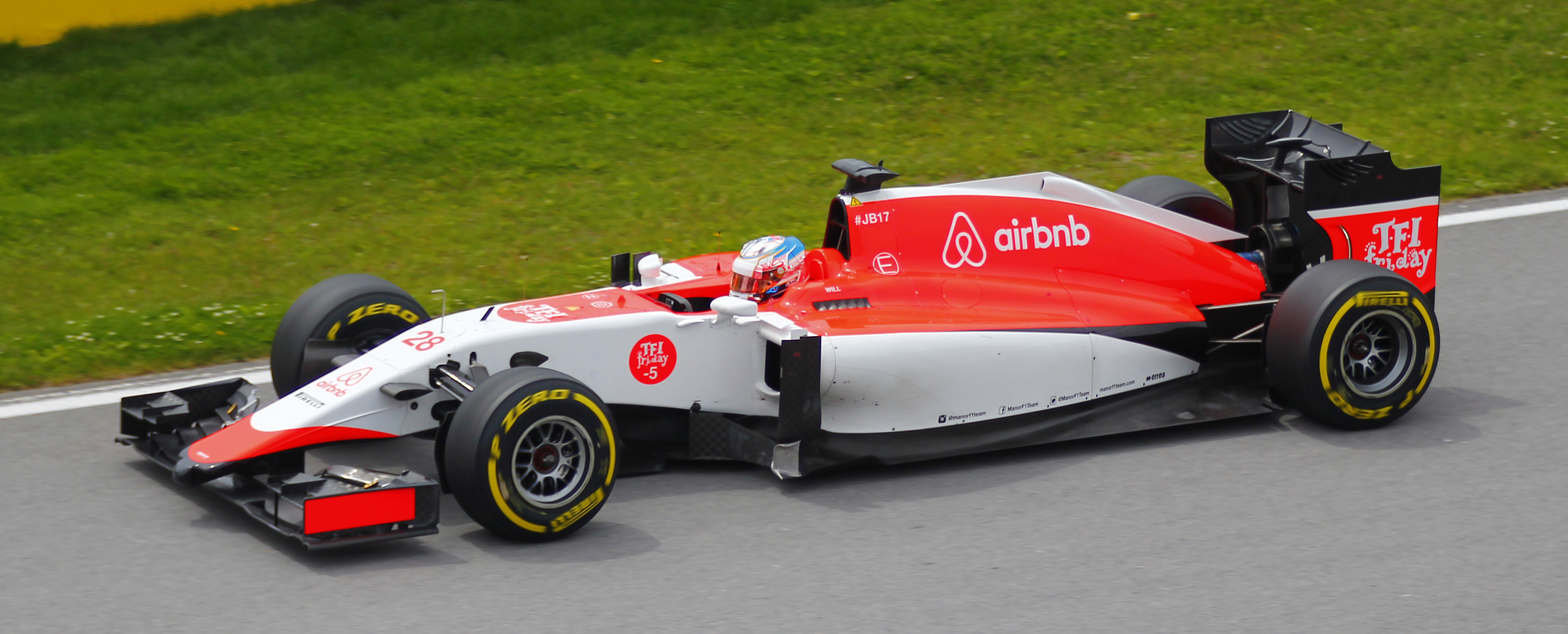 Will Stevens - (Manor-Marussia) - Grand Prix du Canada - Circuit Gilles-Villeneuve - 7 juin 2015 (Photo Paul-Émile Poulin-Jacques)